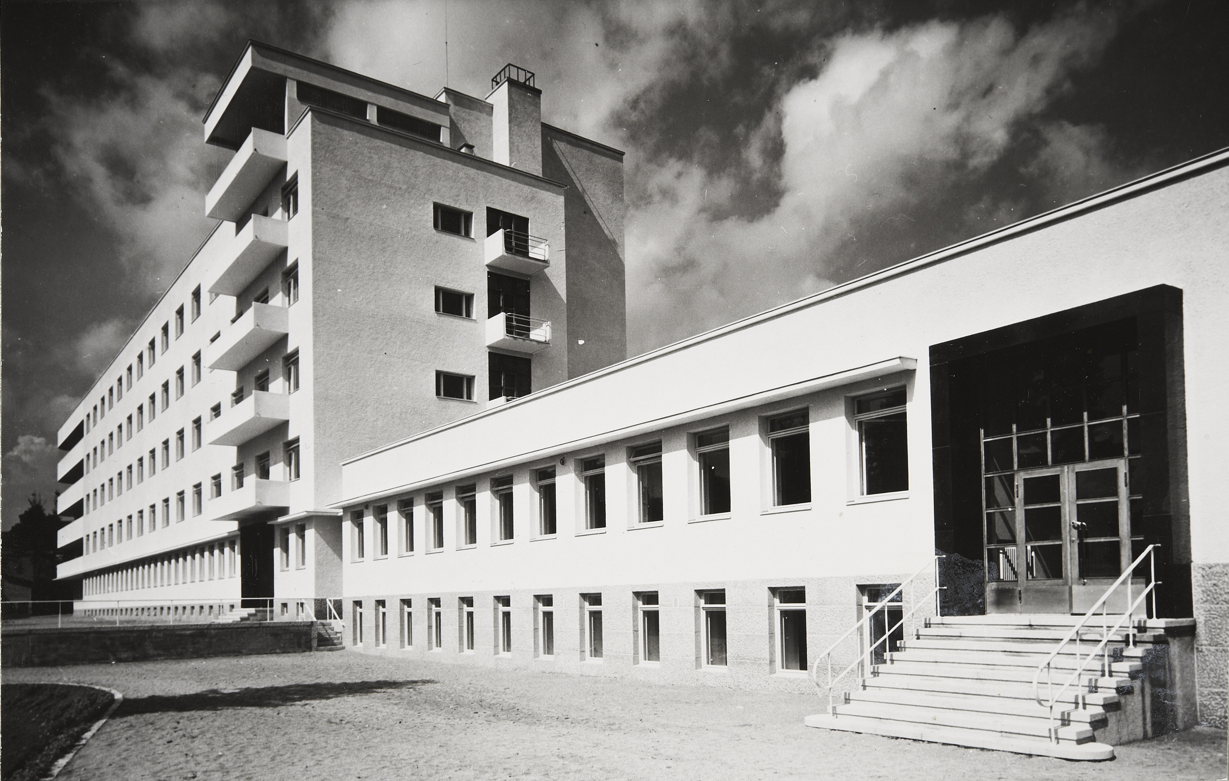 Kuvassa on Mikael Nordenswanin ja Bertel Strömmerin suunnittelema funkistyylinen tuberkuloosi­parantola (myöh. Kaupin sairaala), joka valmistui Tampereen Petsamoon syksyllä 1939. Rakennusta on myöhemmin laajennettu.